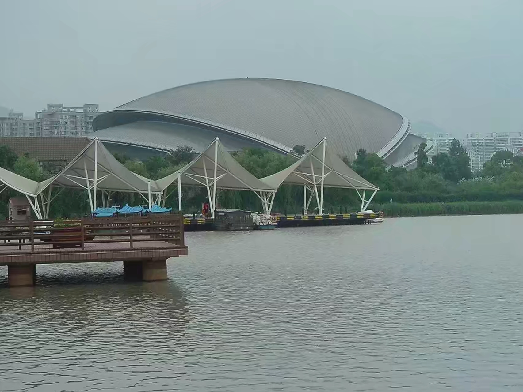 临海体育馆，摄于2015年